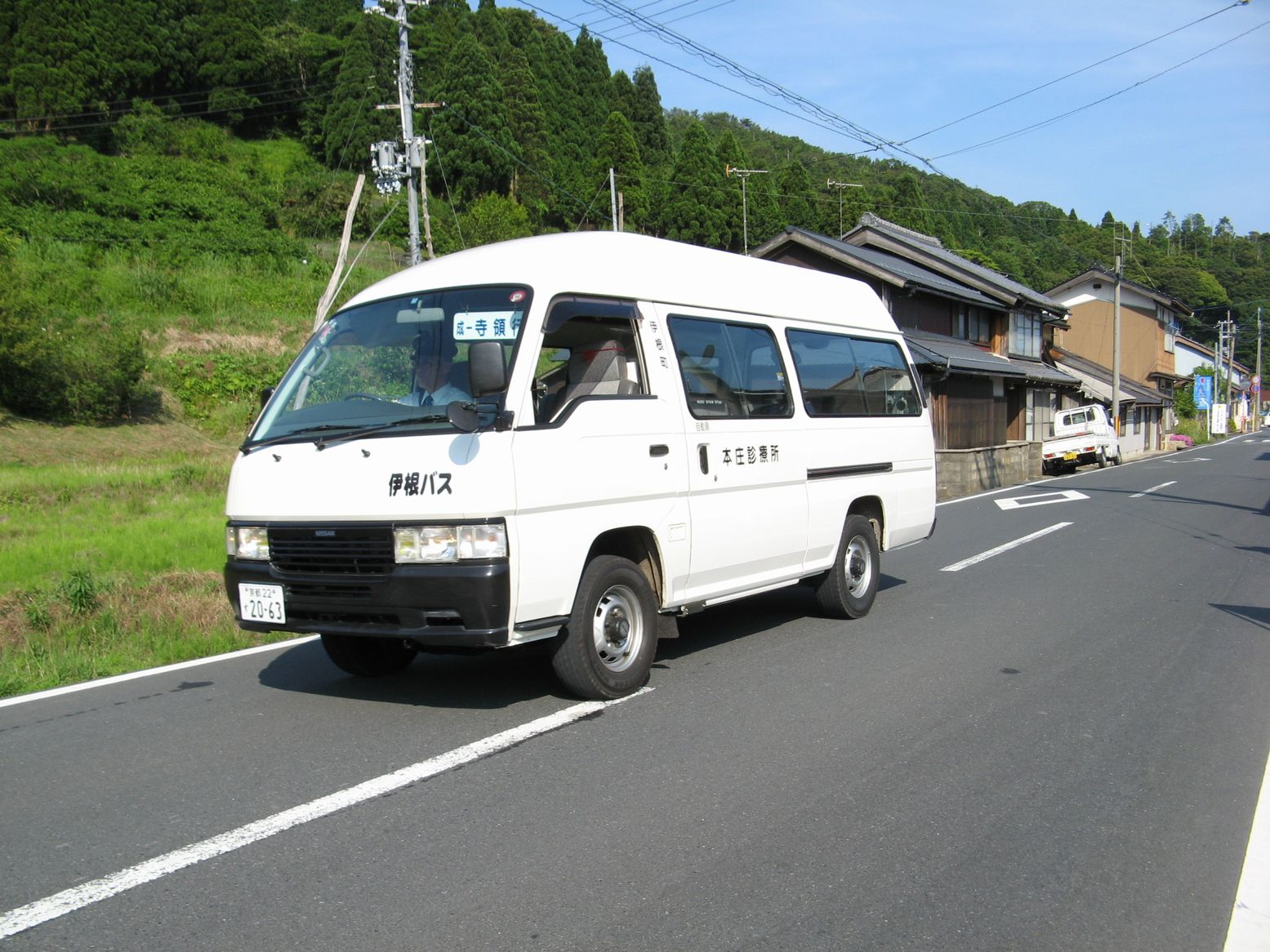 伊根町営バス 宮津高校伊根分校付近にて